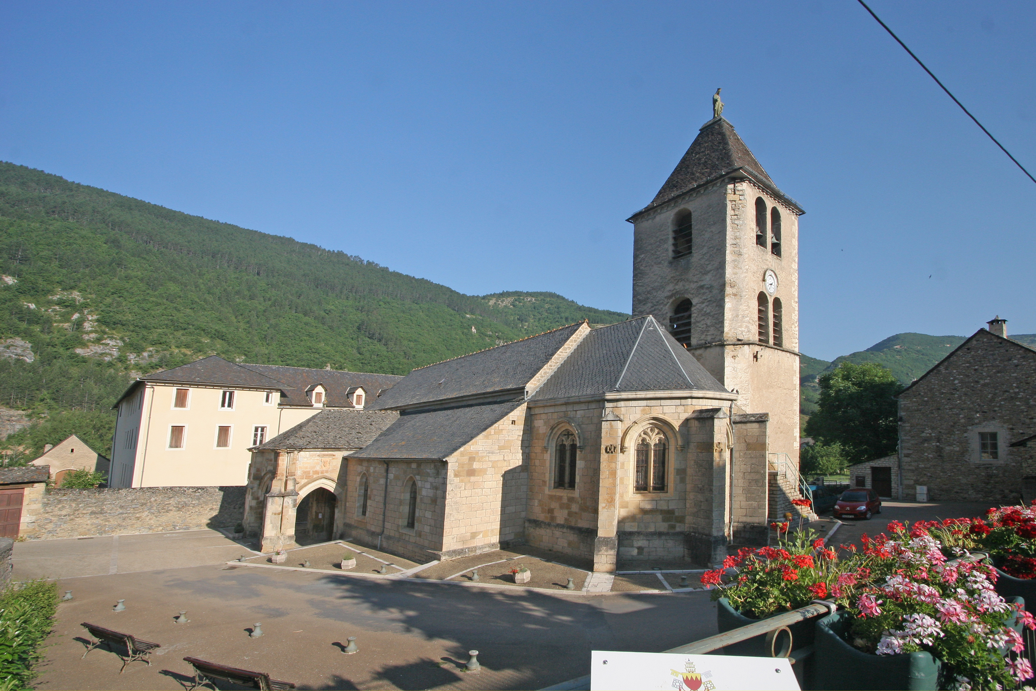 Collégiale Notre-Dame de Quézac